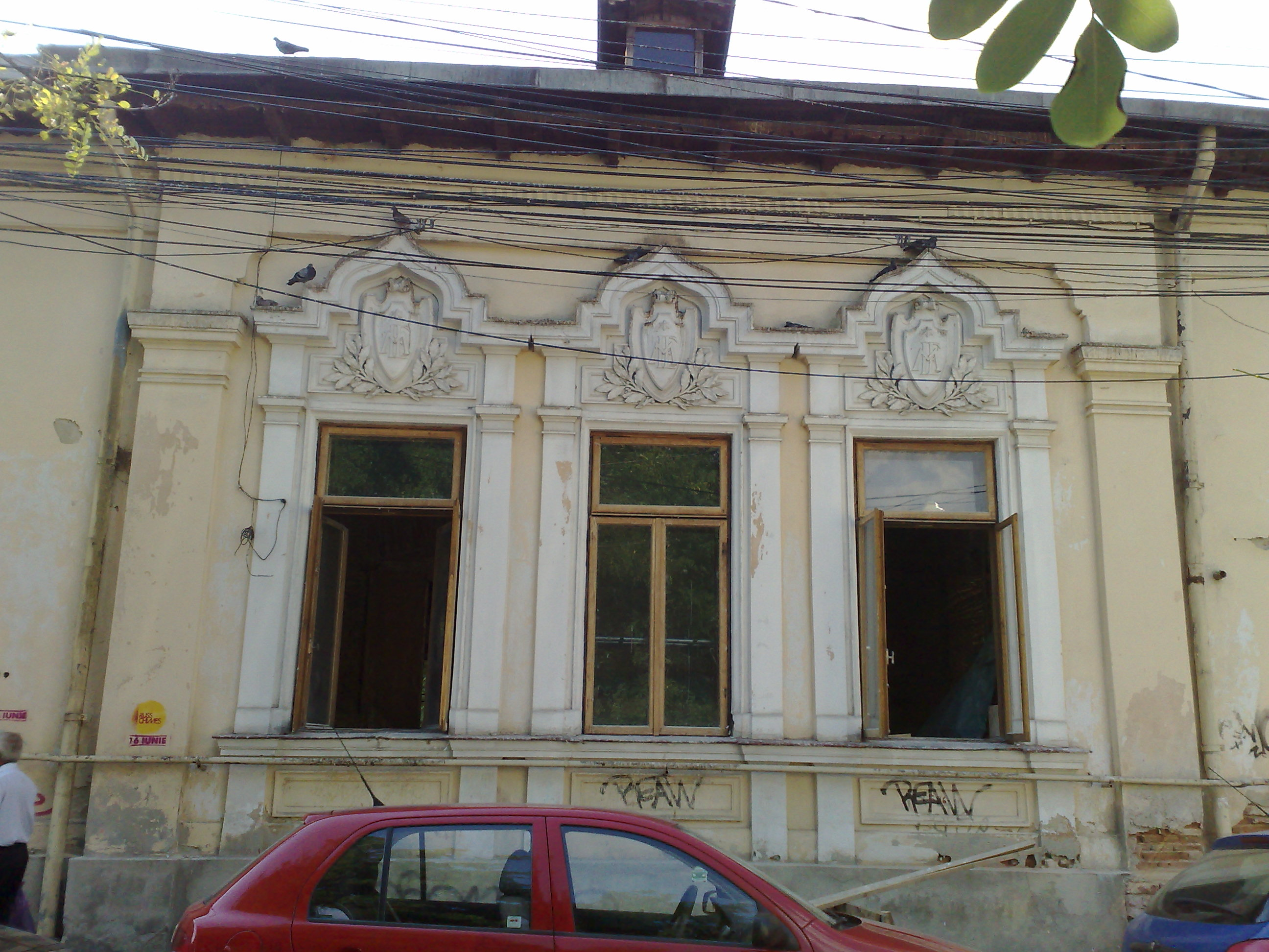 Casa in care a locuit arhitectul Ion Mincu